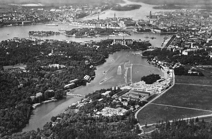 Stockholmsutställningen 1930, flygbild över utställningsområdet